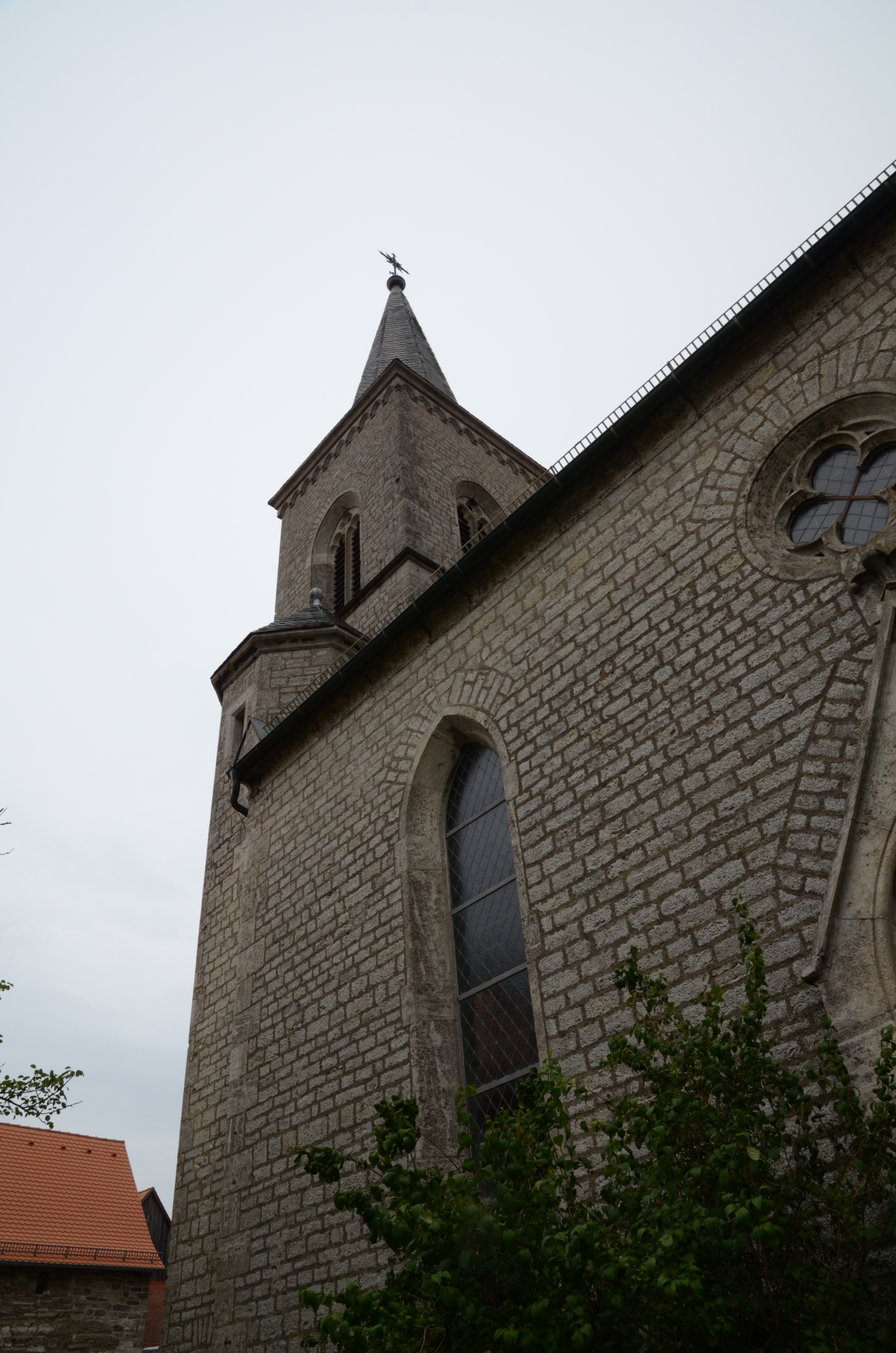 Hüttenheim kath. Kirche